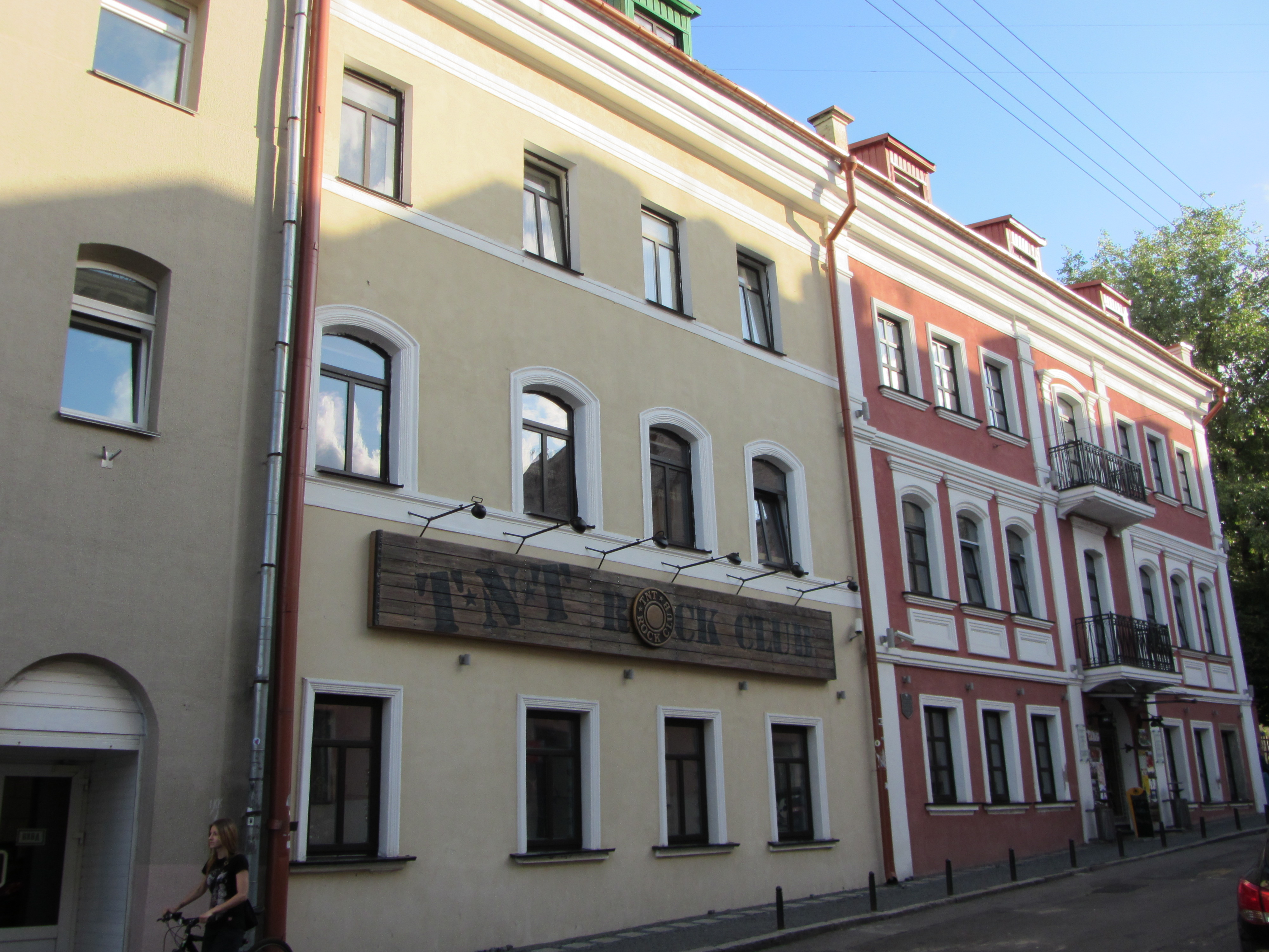 Беларуская (тарашкевіца): Вуліца Рэвалюцыйная, 9,11